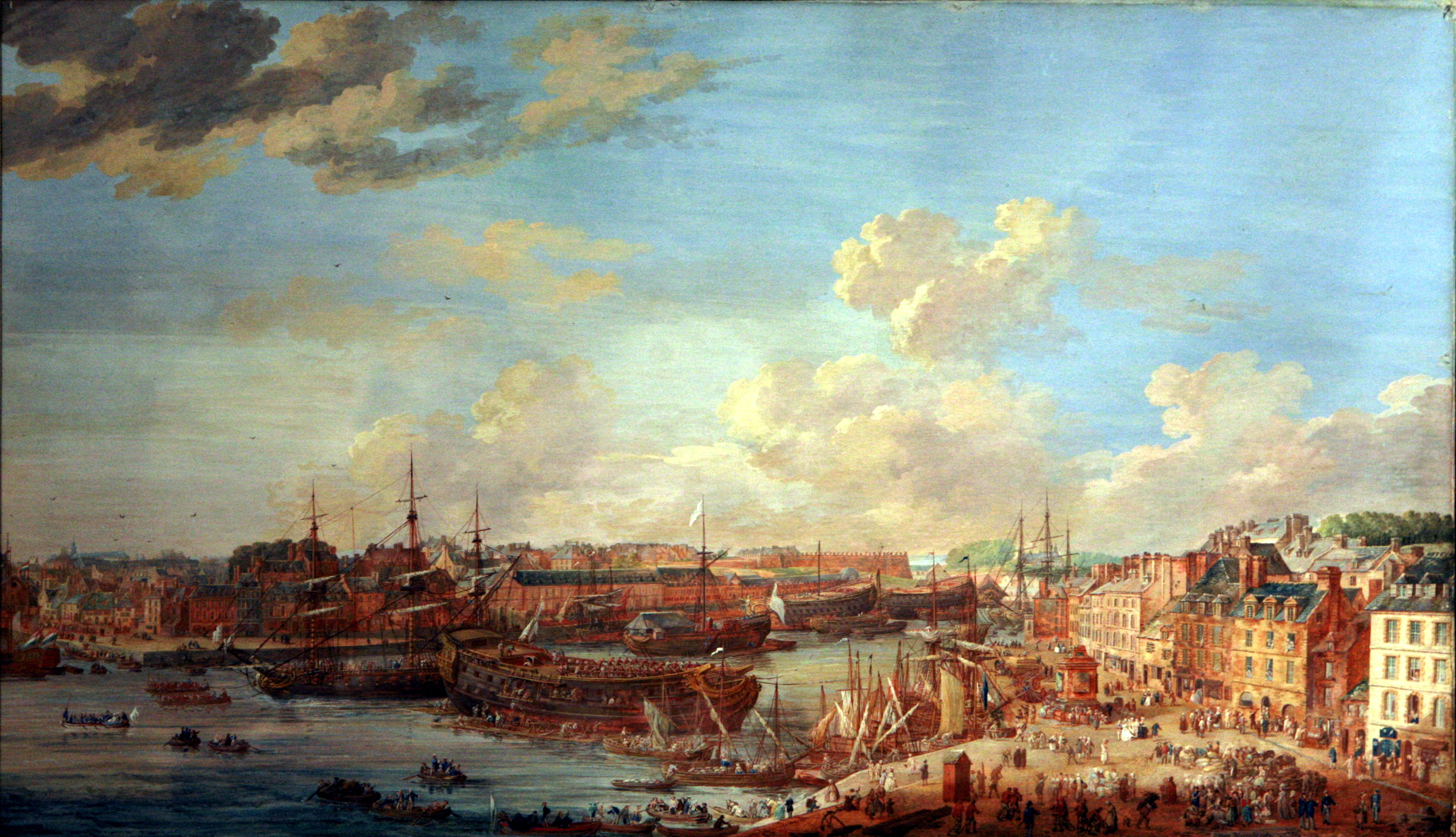 Le Port de Brest, une prise de la mâture